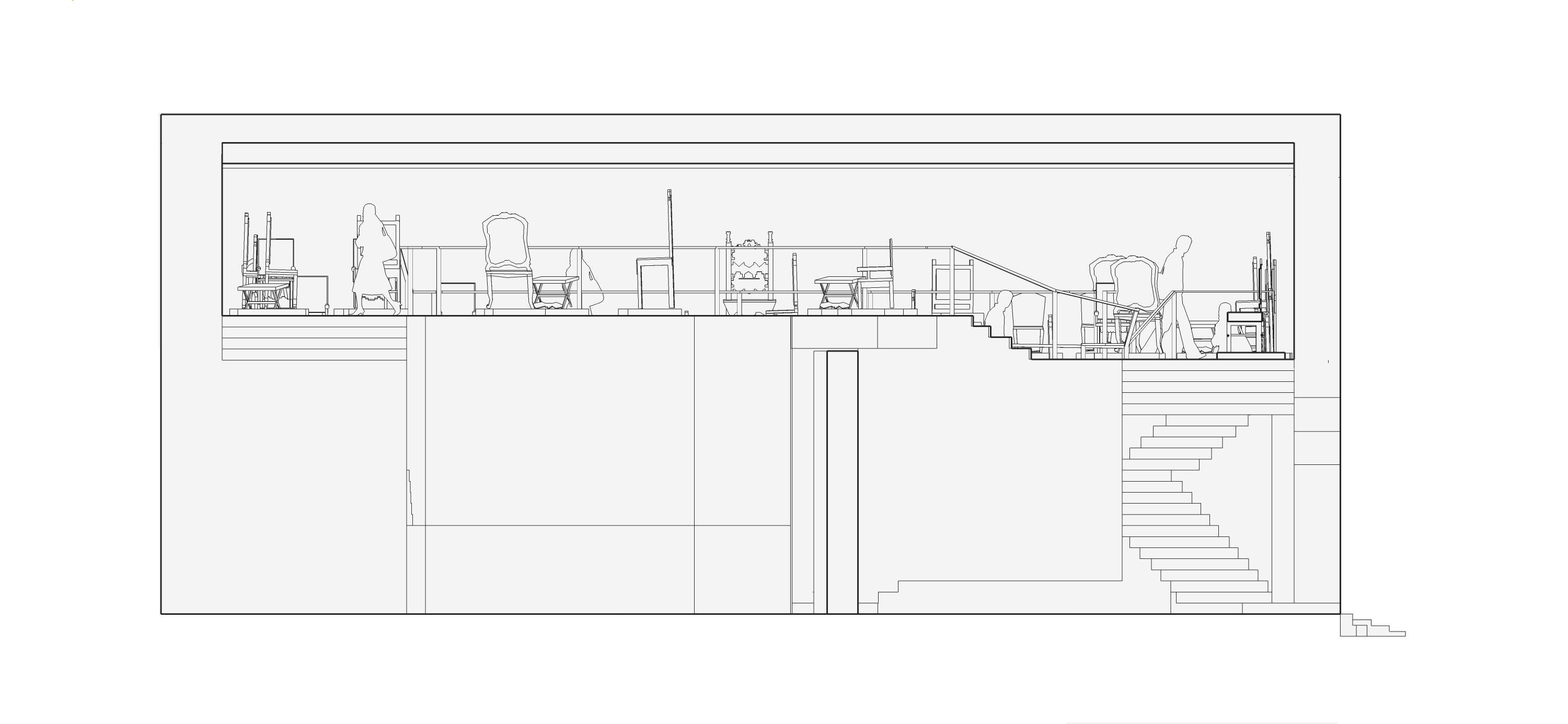 Template:Screenshotcopyrighted